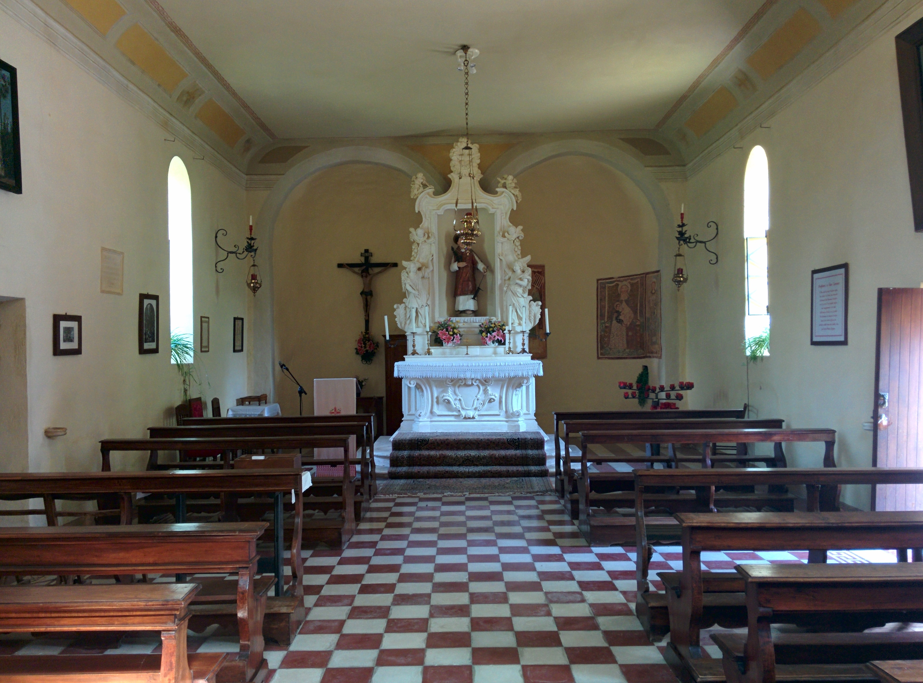 Interno della chiesa di San Lorenzo a Castelnovo di Isola Vicentina, in provincia di Vicenza.